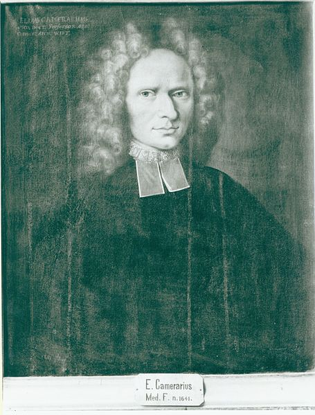 Prof. Elias Rudolf Camerarius (Tübinger Professorengalerie)